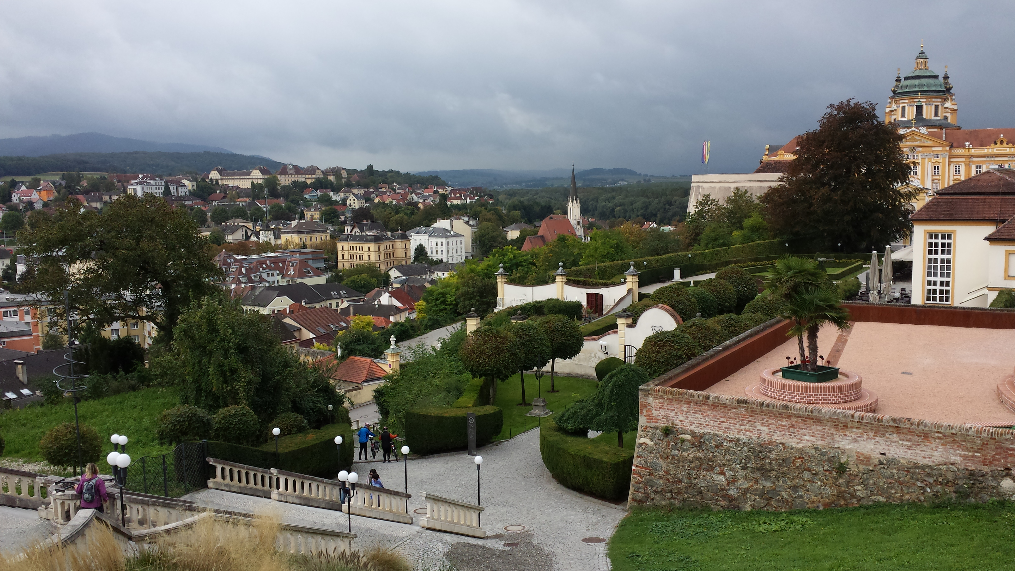 3390 Melk, Austria